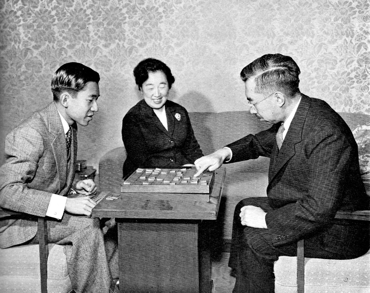 将棋を楽しむ昭和天皇・皇太子明仁親王と香淳皇后